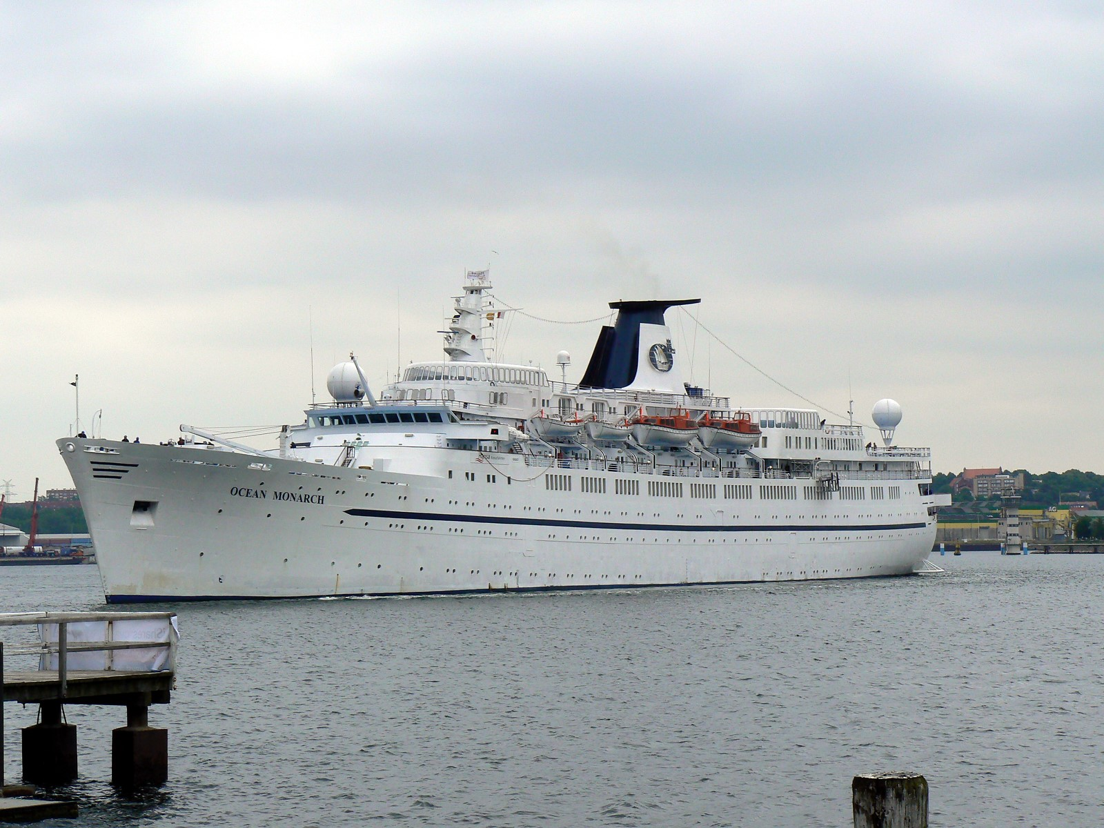 Kreuzfahrtschiff Ocean Monarch im Kieler Hafen